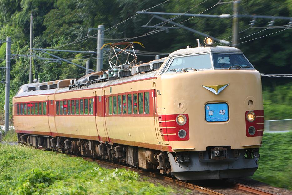 大分運輸センター所属のDo2編成。